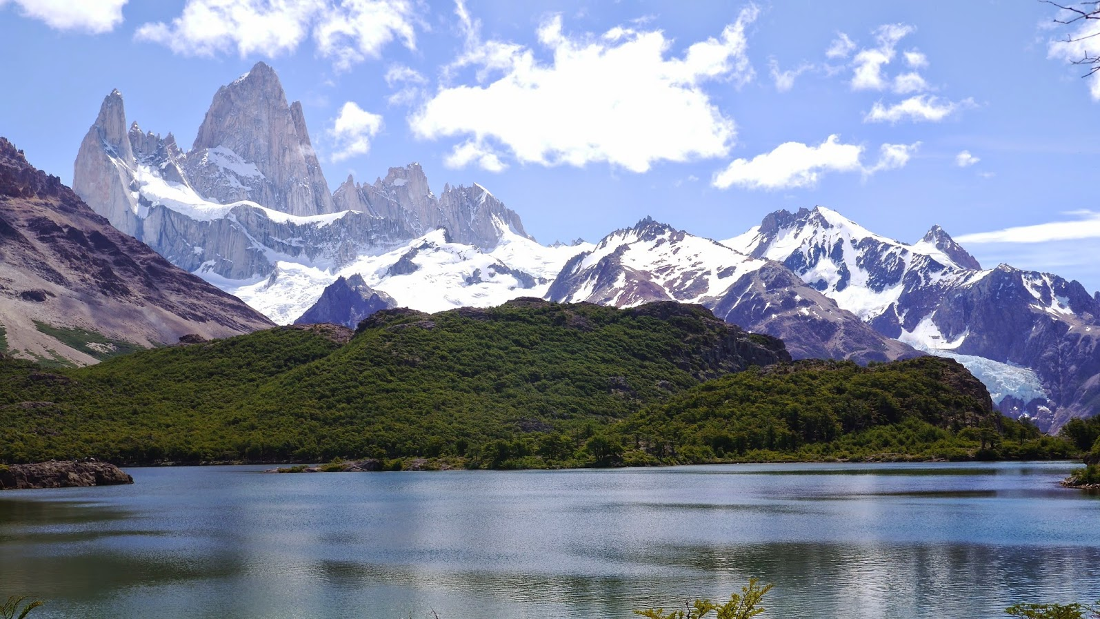 Fitz Roy y laguna Capri - Parque Nacional Los Glaciares - 16 de Enero de 2015